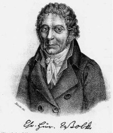 Portrait Christian Heinrich Wolke